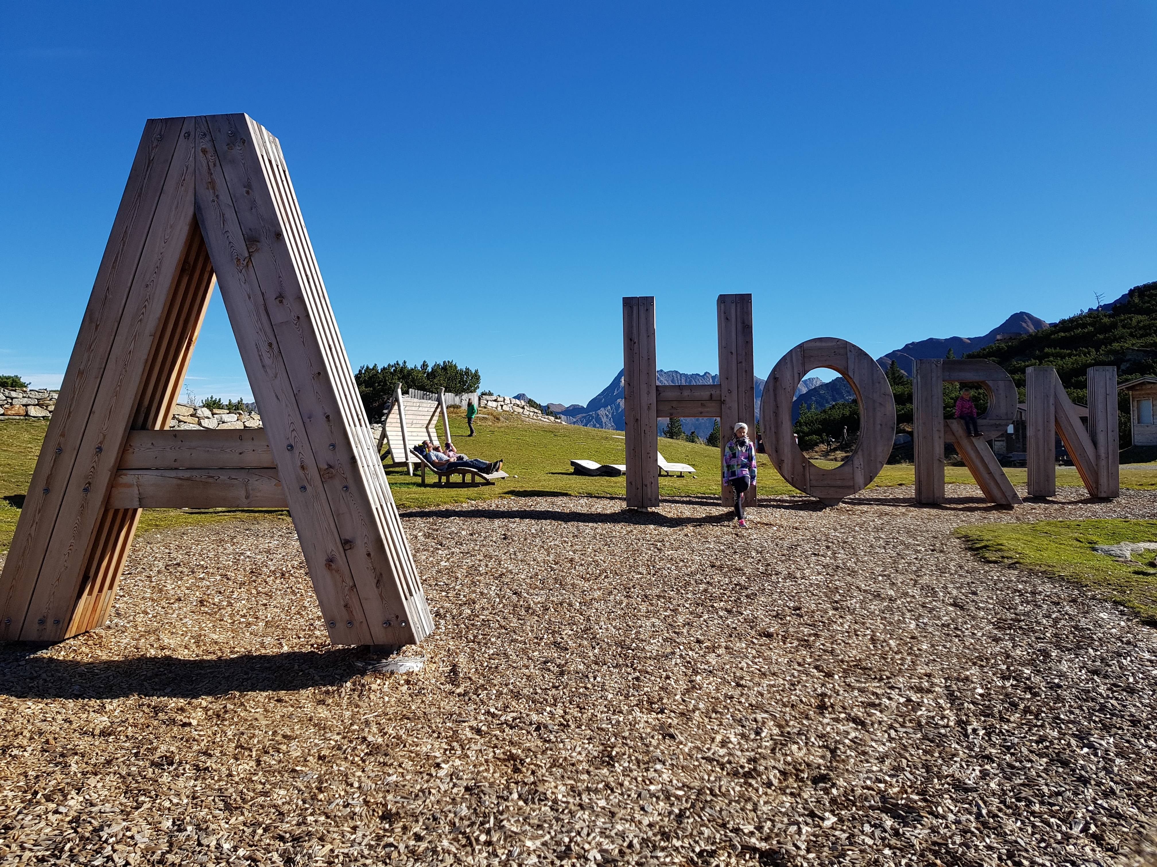 Ahorn an der Bergstation